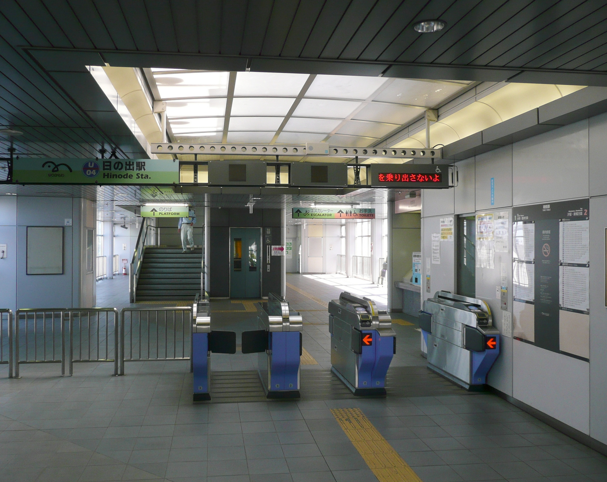 日の出駅改札口